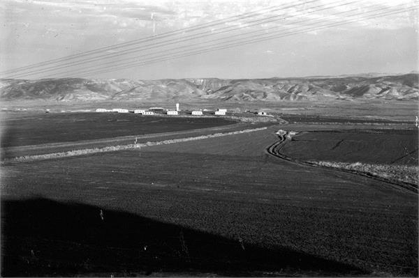 "חרמונים" - מראה כללי.